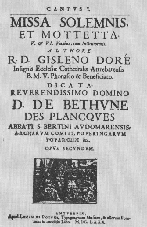 Title page of Ghislain Doré's Missa solemnis, 1680